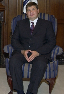 Latvian Prime Minister Aigars Kalvitis